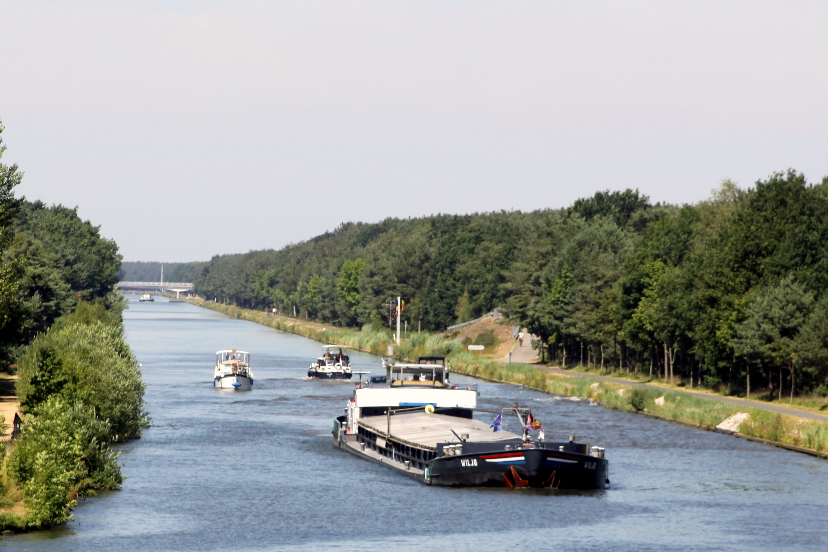 De Kanal Bocholt-Herentals zu Lommel an Direktioun Herentals gekuckt